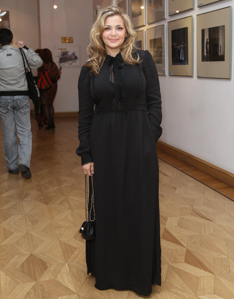 Ирина Пегова на вручении премии "Золотая маска" 2013 года